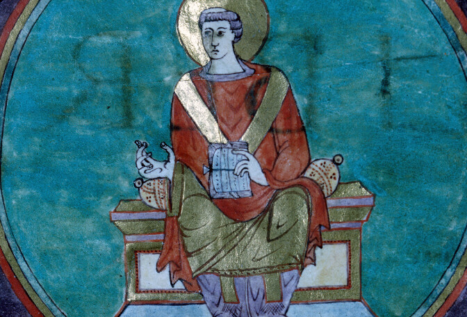 Saint Grégoire, Autun - BM - ms. 0019 bis, Sacramentaire de Marmoutier à l'usage d'Autun, vers 845-850, Touraine, Marmoutier, abbaye Saint-Martin ; Tours, collégiale Saint-Martin.